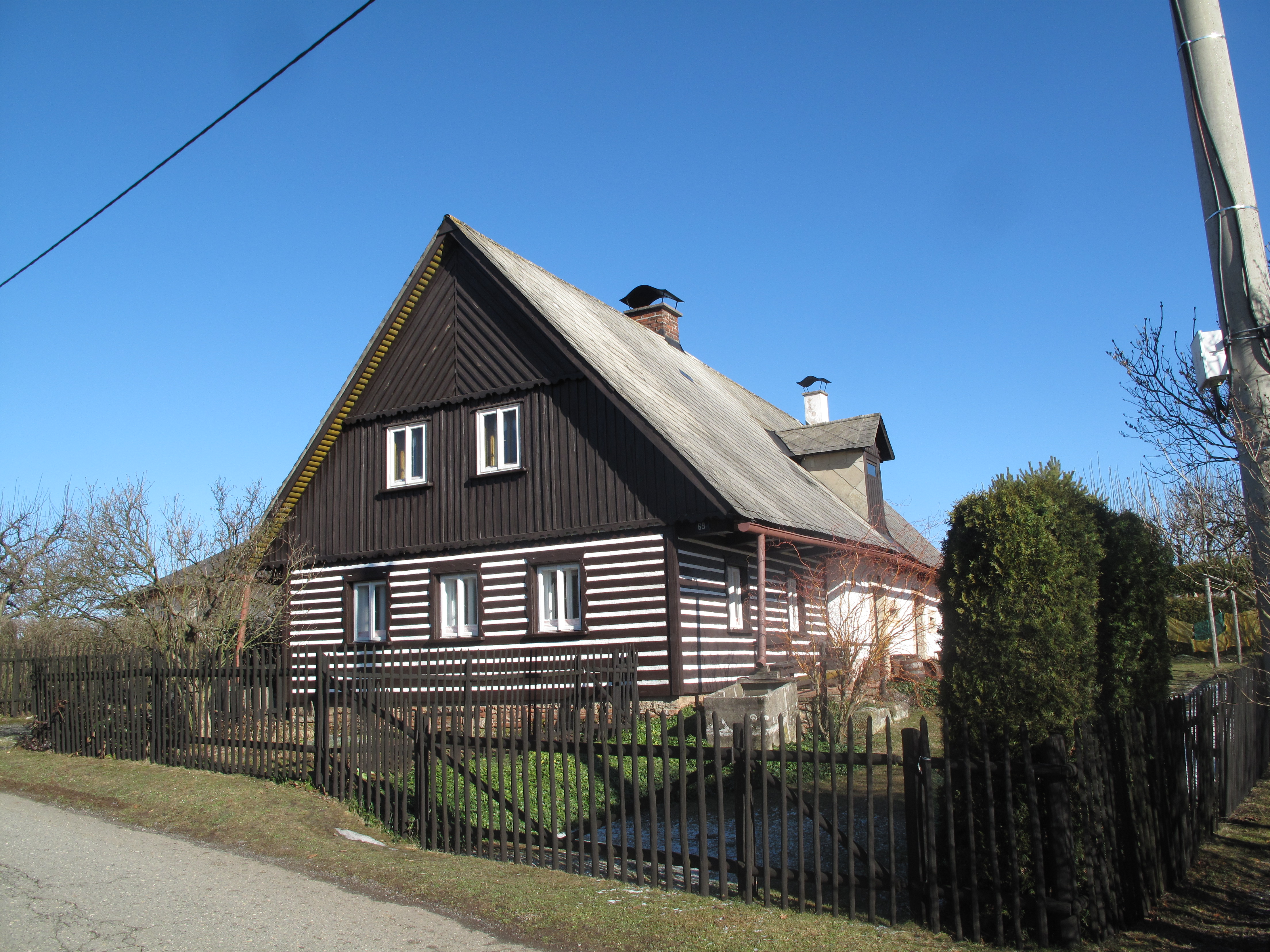 Česky: Kostelecké Končiny. Červený Kostelec-Horní Kostelec č. p. 69 (shodné číslo popisné se ale nachází i v zábrodské části Končin, asi 200 metrů od tohoto stavení). - OpenStreetMap(Info)